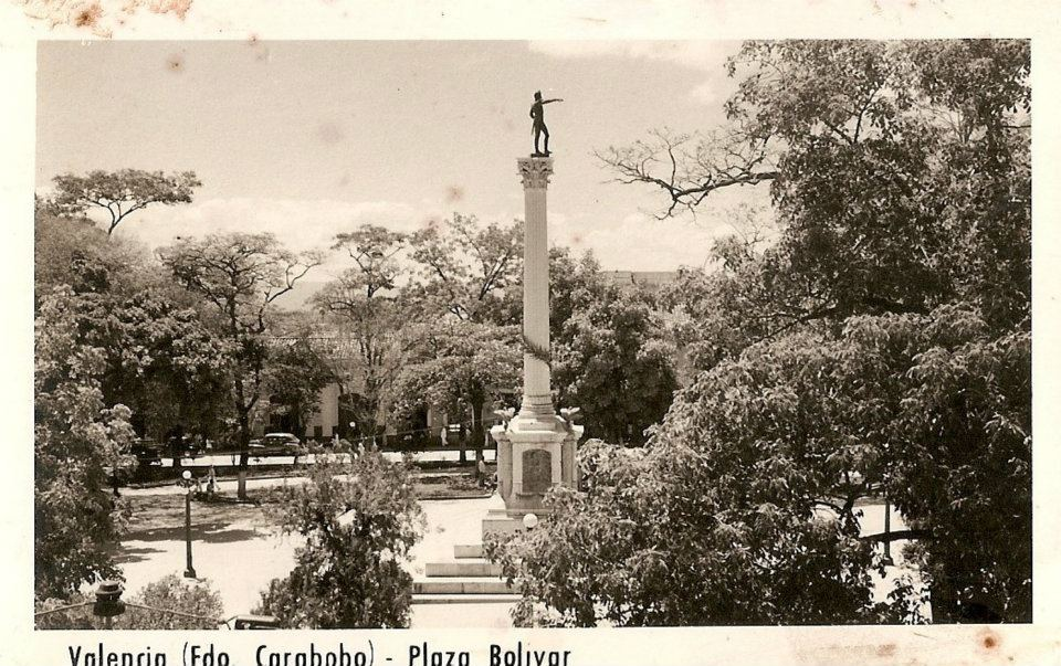 Postal Venezolana de 1950 en la que observa la Bolivar de Valencia, estado Carabobo - Venezuela